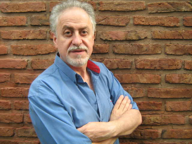 Periodista y poeta argentino